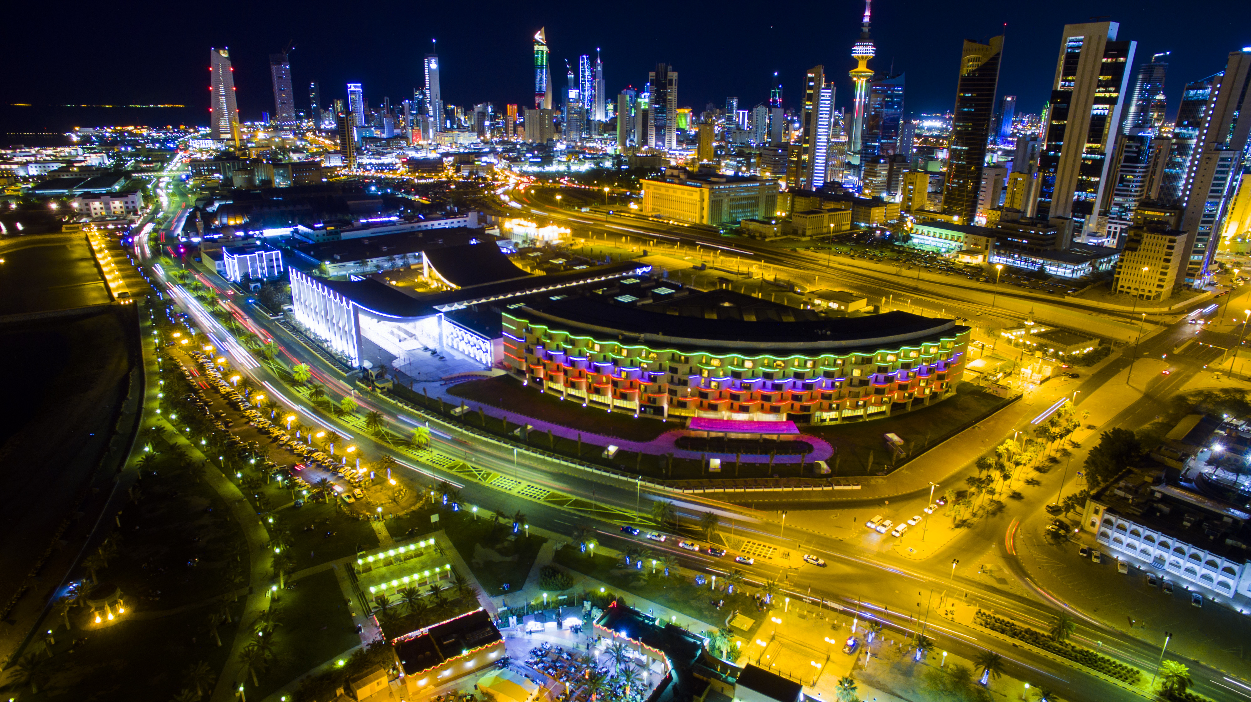 صورة جوية لمبنى مجلس الامة